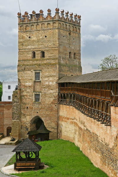 Луцкий замок